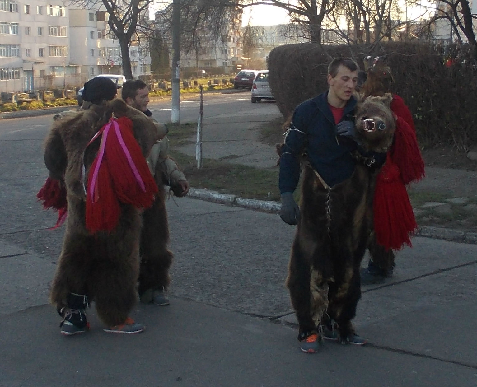 Ceată de urători îmbrăcaţi în urşi, Iaşi